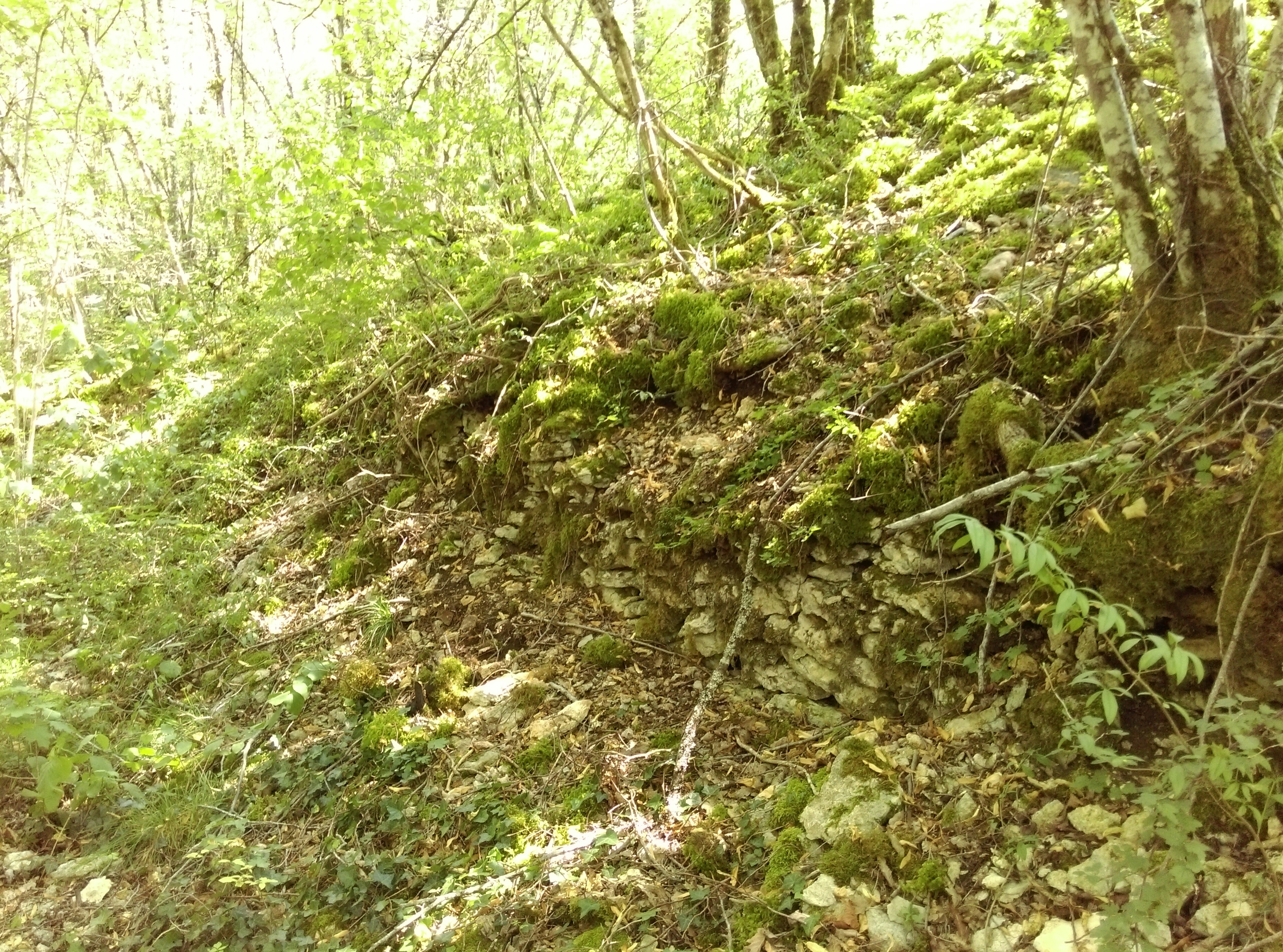 Vestige du rempart gallo-romain du mont Afrique, sur la commune de Flavignerot en Côte-d'Or près de Dijon. On aperçoit une partie du rempart de l'époque constitué d'un agencement de pierres sèches.